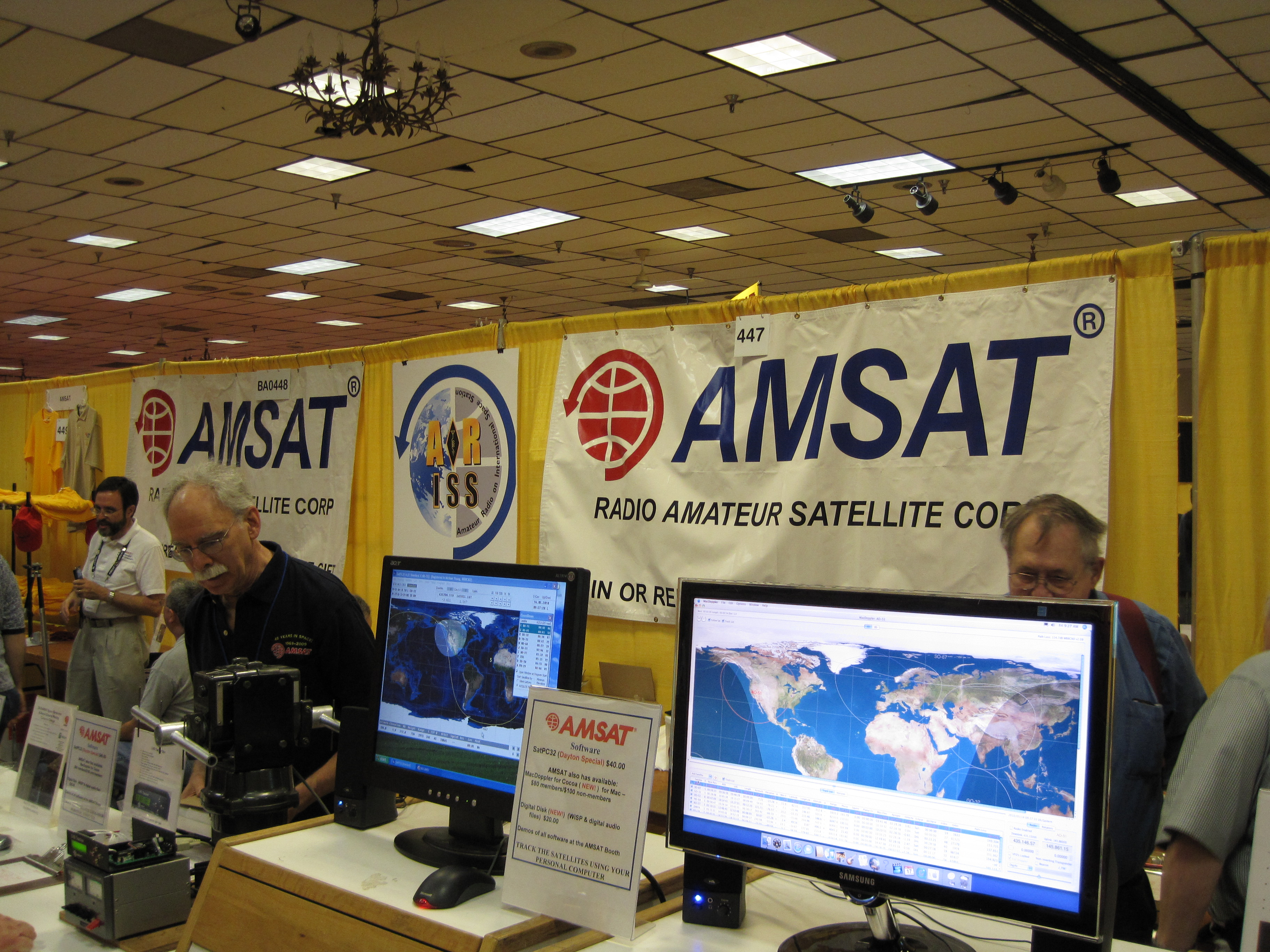 AMSAT